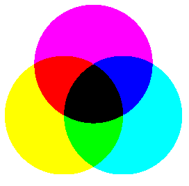 Synthèse soustractive des couleurs